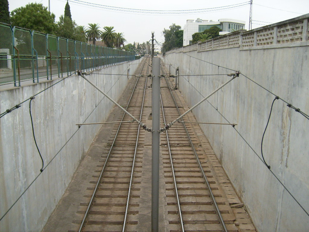 Trémie près de la station Bardo du métro léger de Tunis